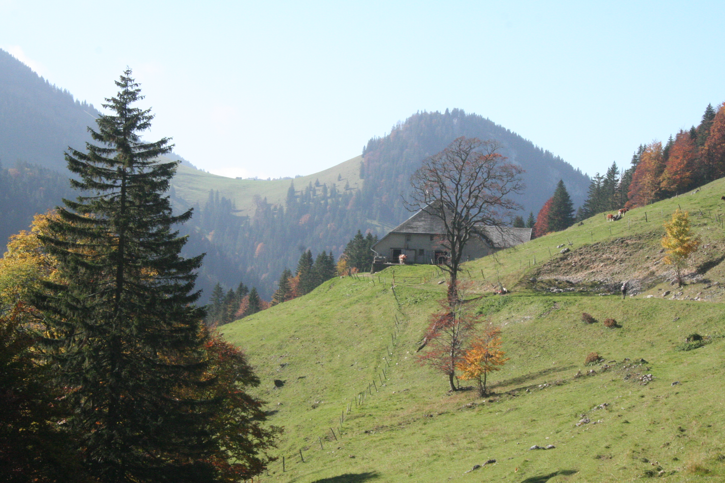 Le chalet de la Dénériaz-dessus et le Mont de la Maya.